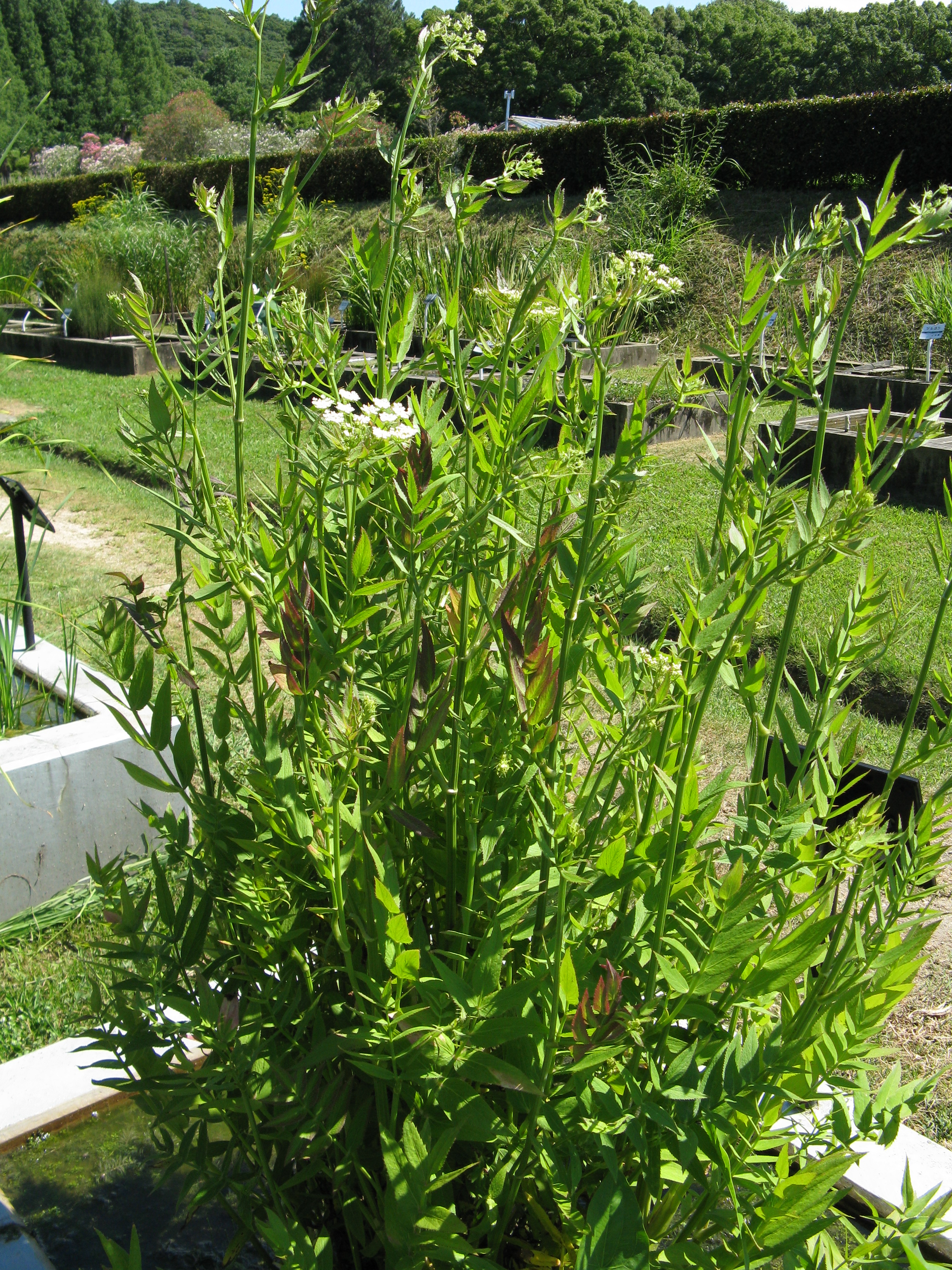 Scientific name Sium suave var. nipponicum